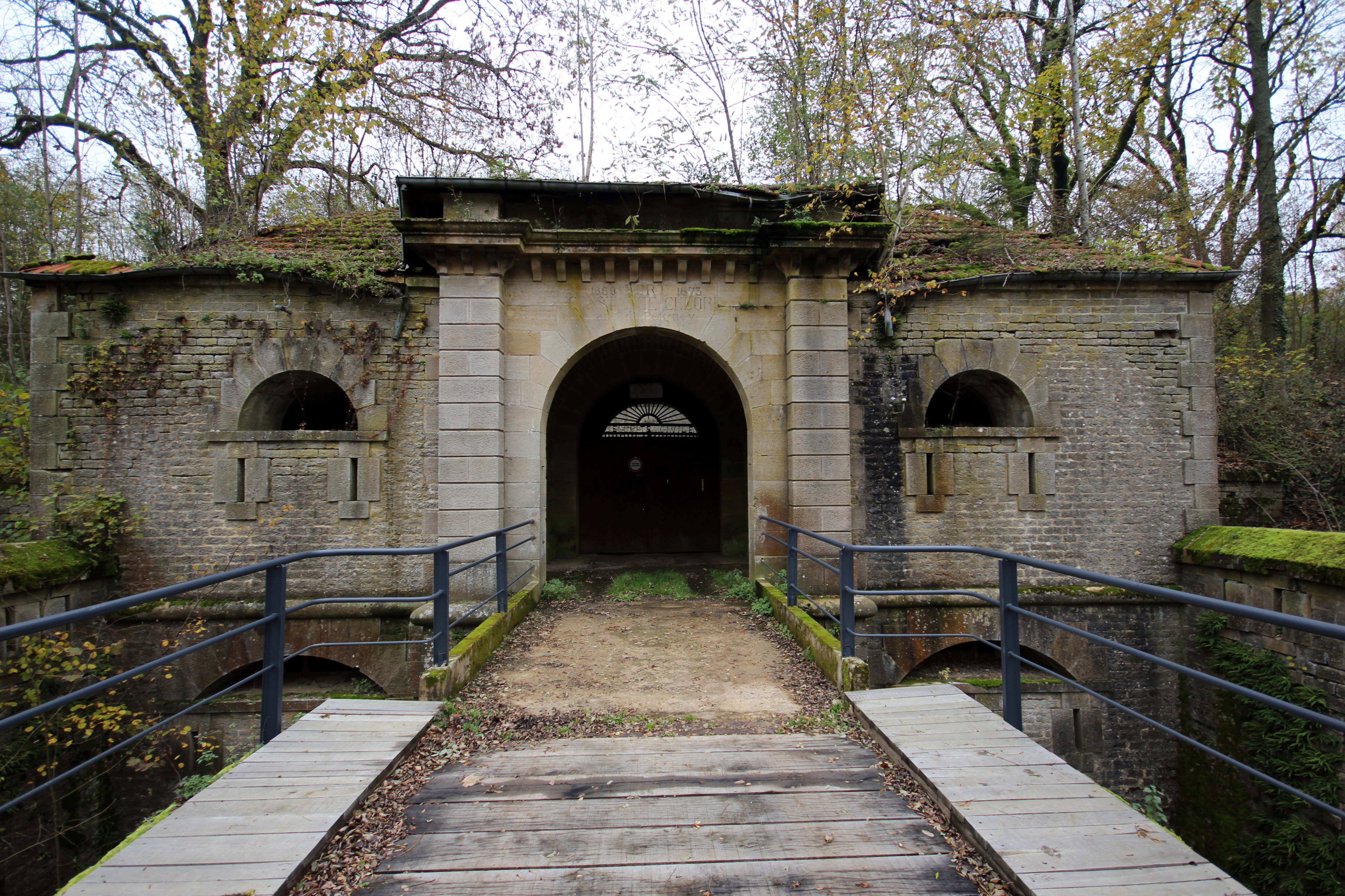 L'entrée du fort de Peigney